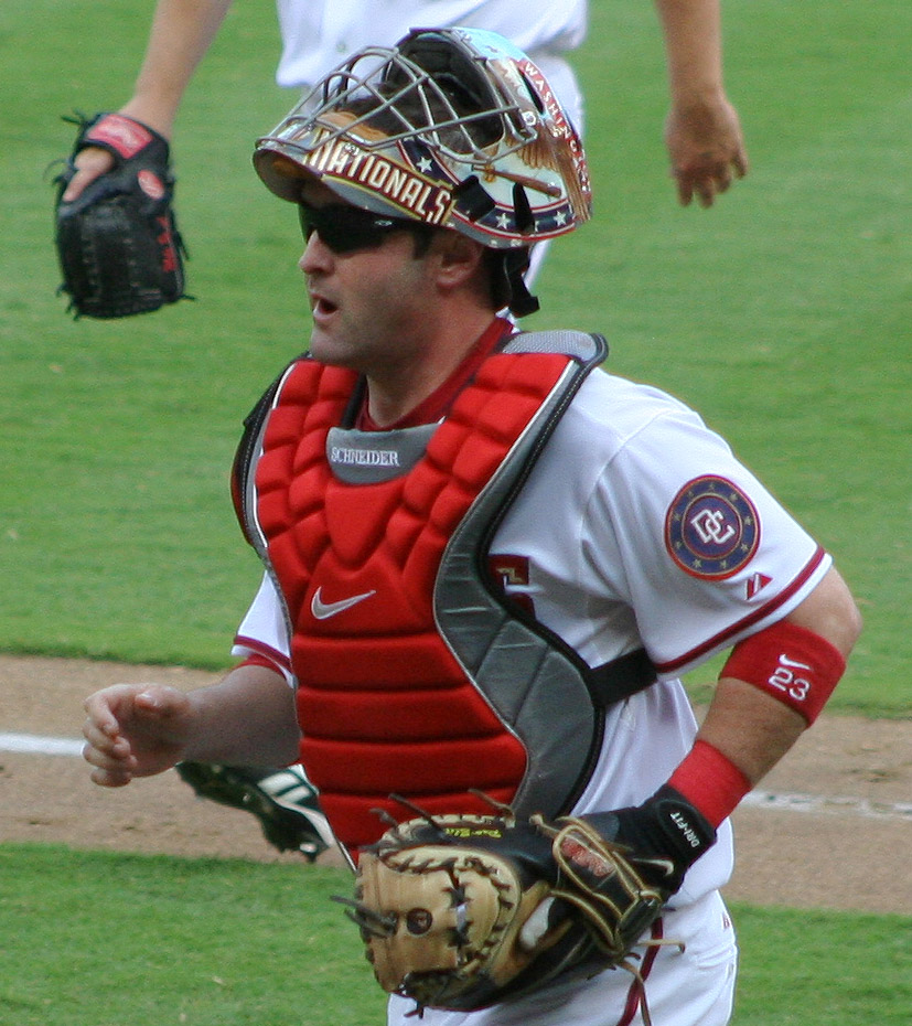 Brian Schneider